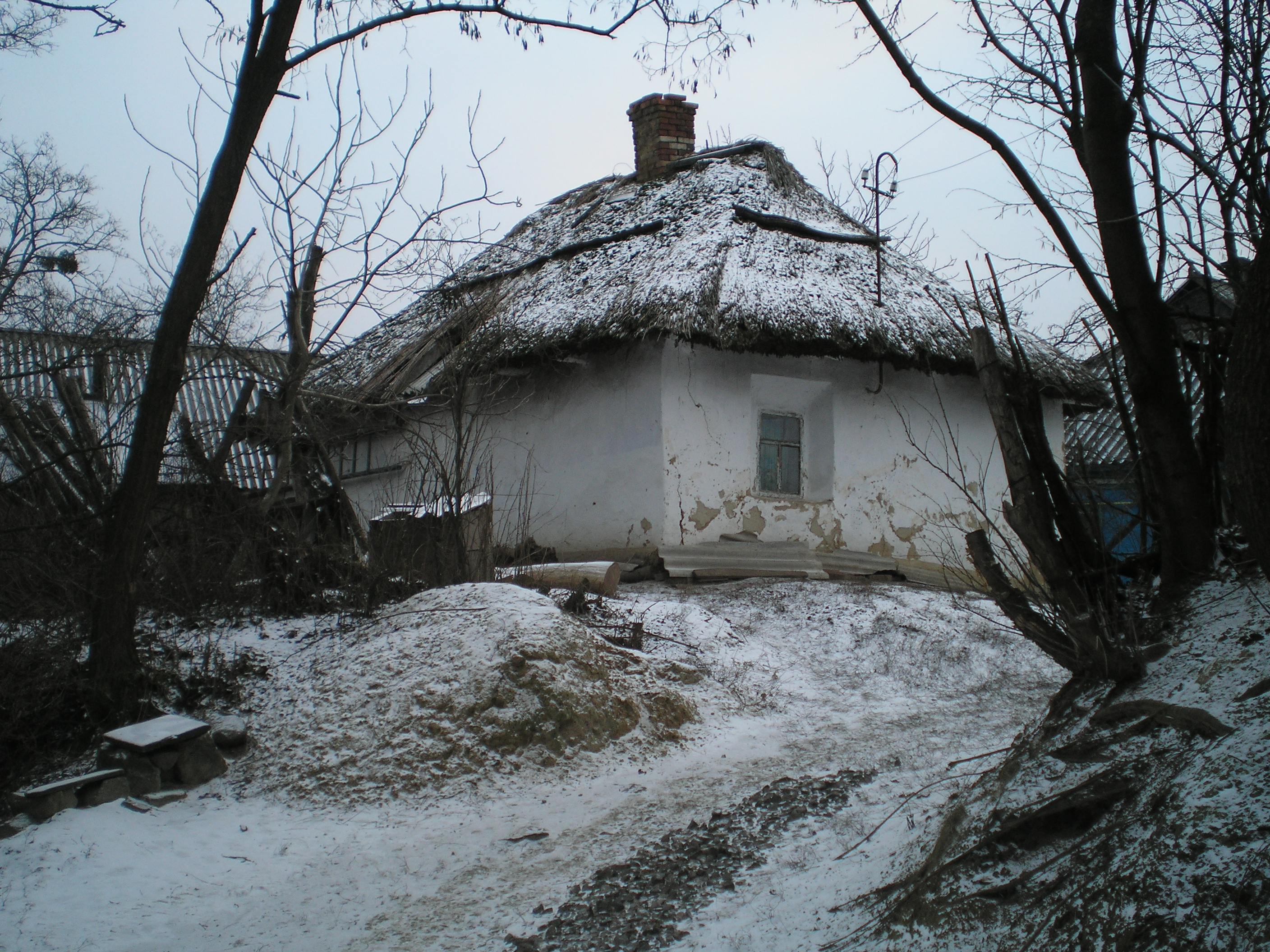 Хатка-мазанка, с. Терни